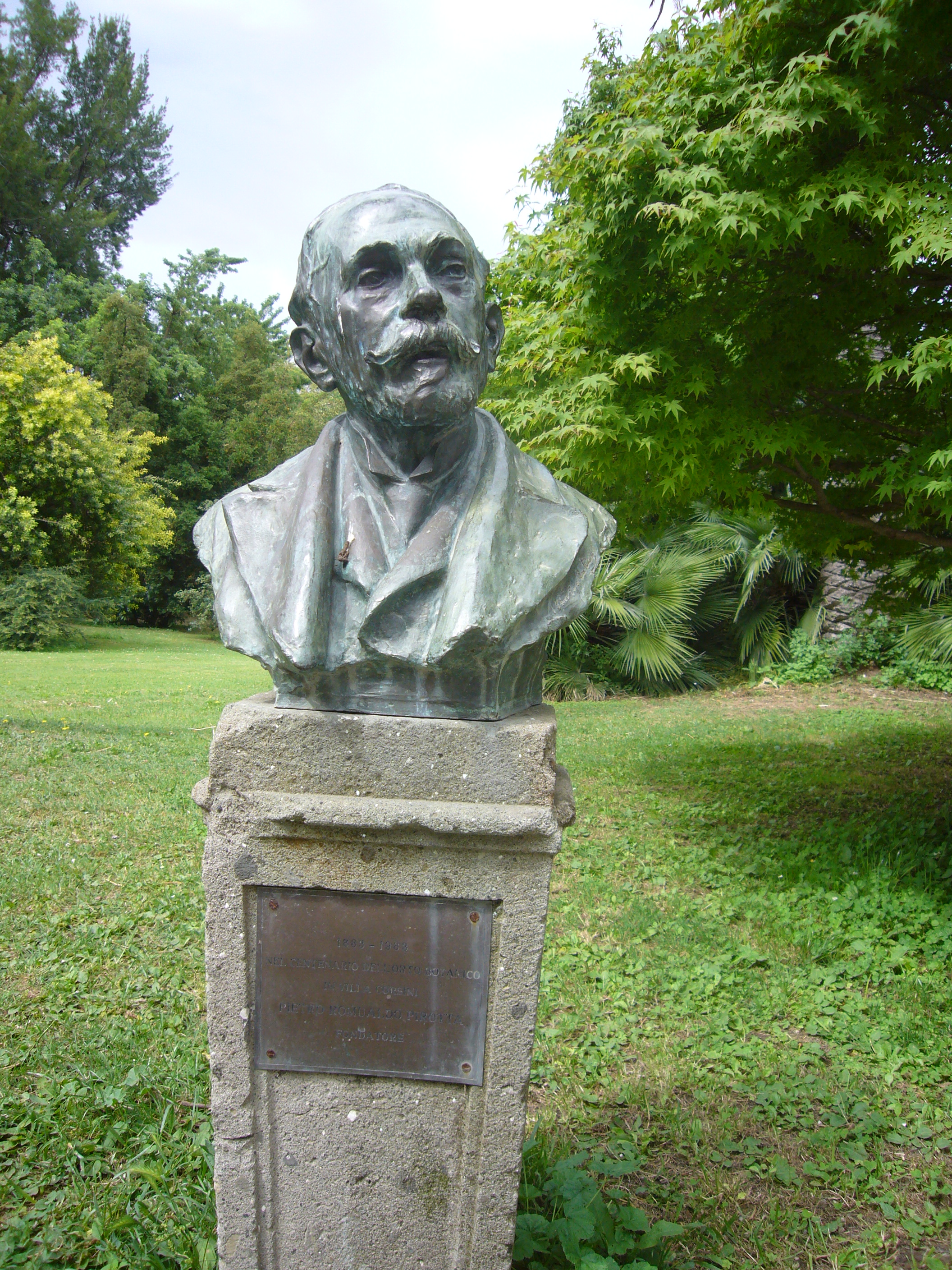 Roma, Orto botanico - busto di Pietro Romualdo Pirotta per il centenario dell'apertura dell'orto botanico a Villa Corsini